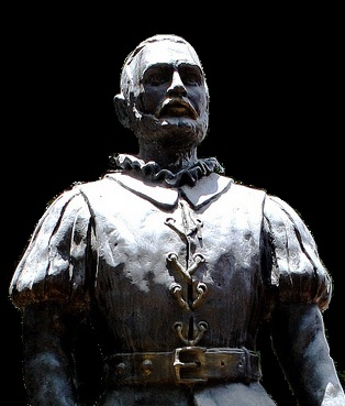 Estatua de Juan Martin de Ampués a Veneçuela